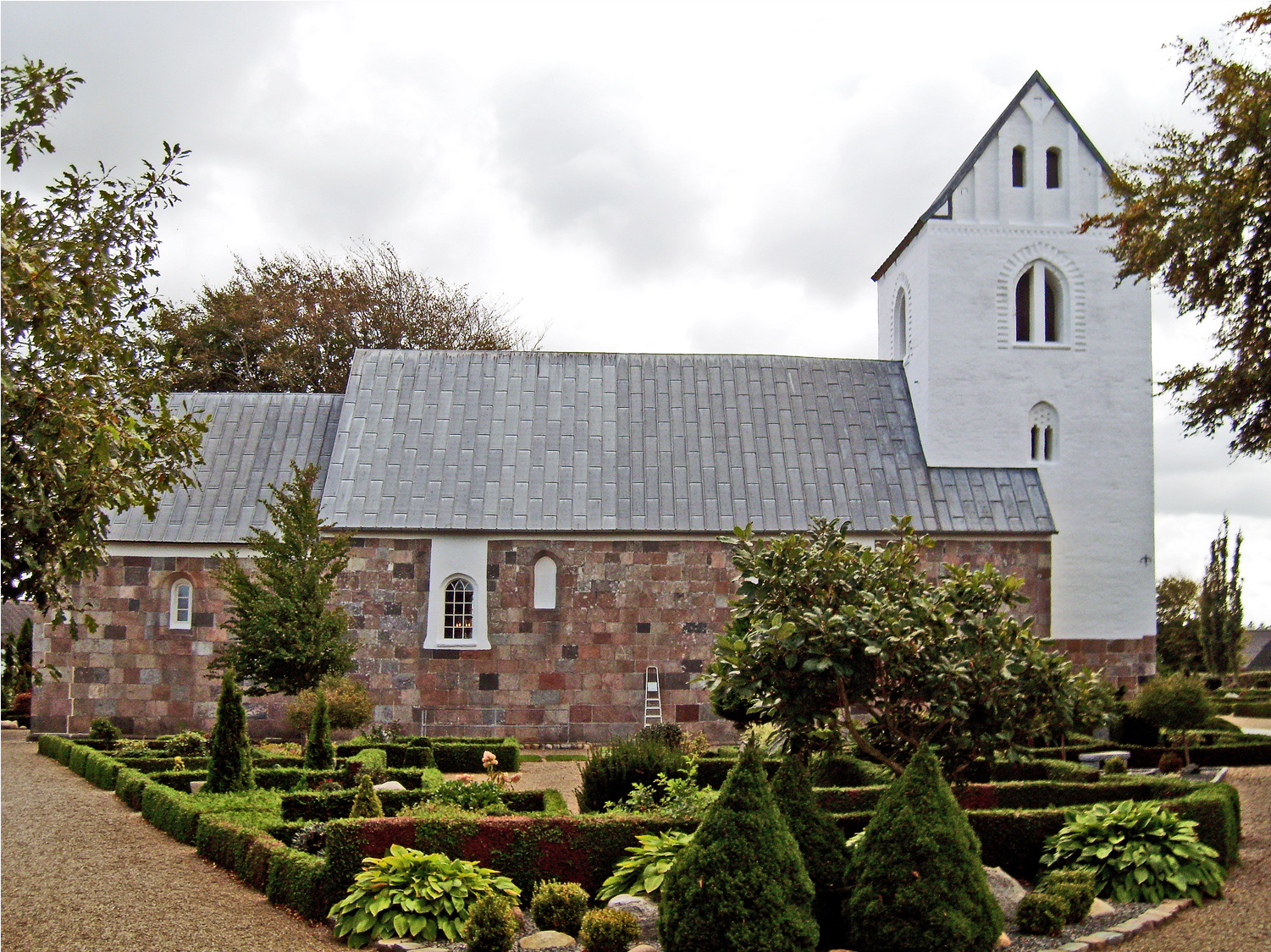 fra nord